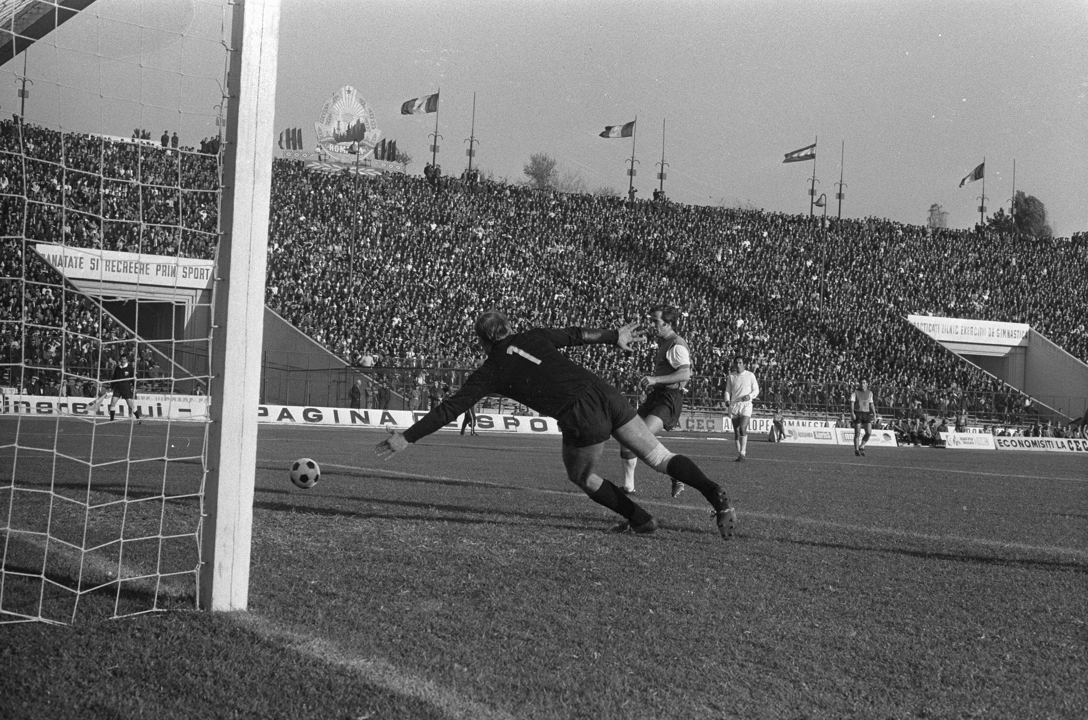 Collectie / Archief : Fotocollectie Anefo Reportage / Serie : [ onbekend ] Beschrijving : Dynamo Boekarest tegen Feyenoord 0-3, Europa Cup I , doelpunt van Maiwald Datum : 20 oktober 1971 Trefwoorden : sport, voetbal Persoonsnaam : Dynamo Boekarest Instellingsnaam : Feyenoord Fotograaf : Verhoeff, Bert / Anefo Auteursrechthebbende : Nationaal Archief Materiaalsoort : Negatief (zwart/wit) Nummer archiefinventaris : bekijk toegang 2.24.01.05 Bestanddeelnummer : 925-0611